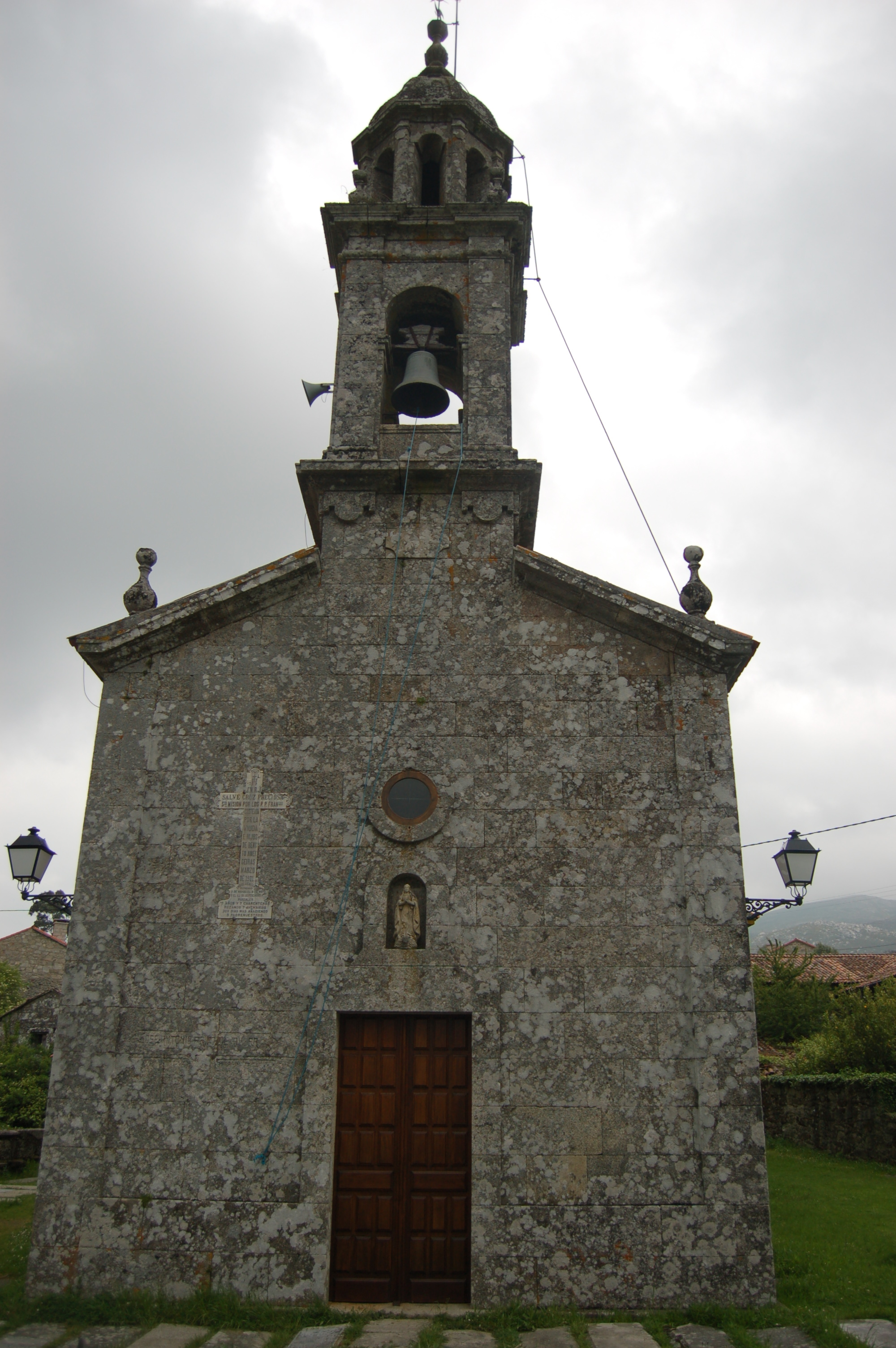 Igrexa parroquial de Santa María de Cequeril (Cuntis)